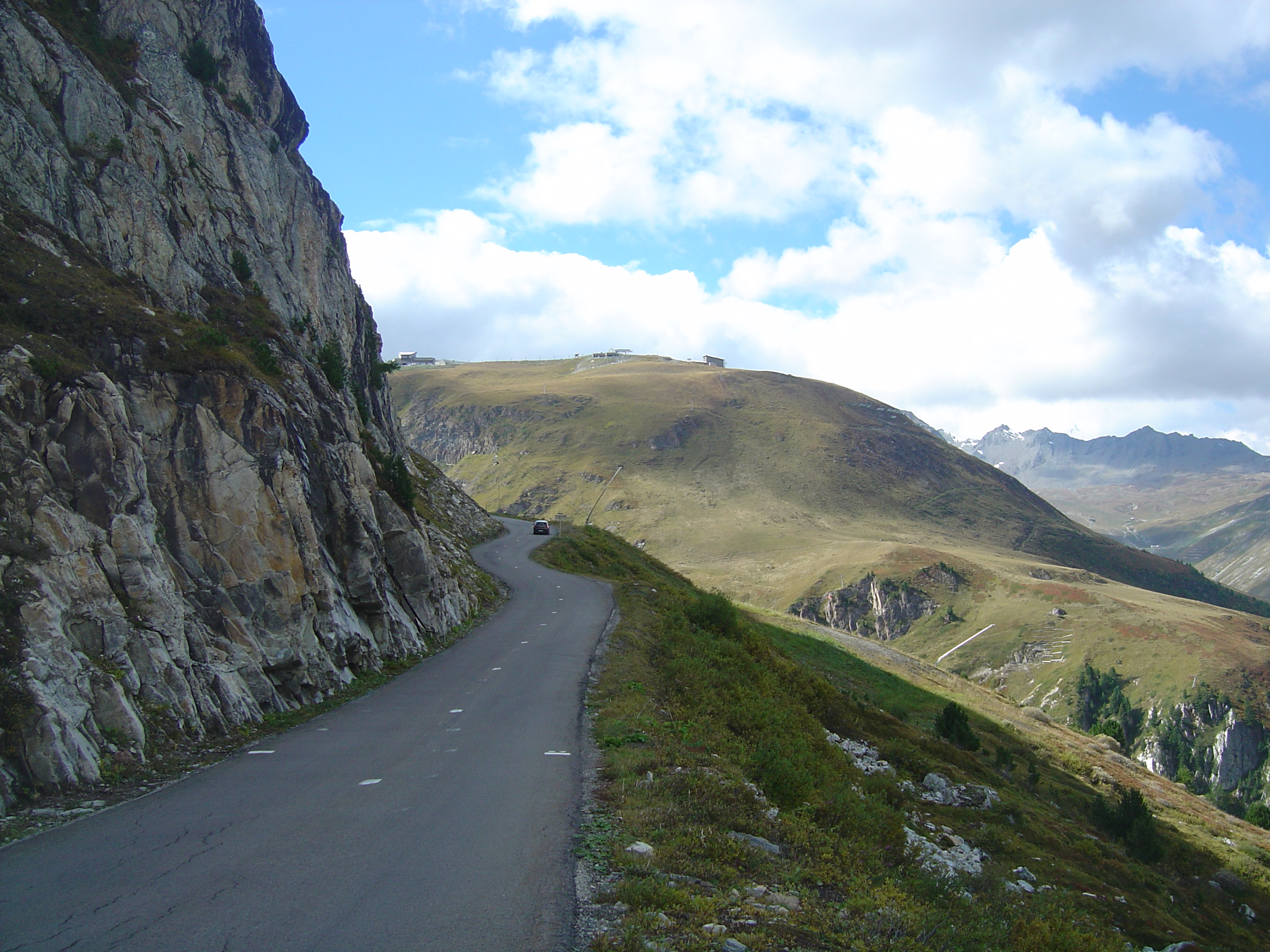 Route du col de l'Iseran sur le versant nord. Après être arrivé à la gare Téléphérique du Signal, environ 9 km après Val d'Isère, une courte descente suit avant ce passage sur la photo, l'un des plus raides de la montée sur ce versant, même si la photo n'en rend pas bien compte